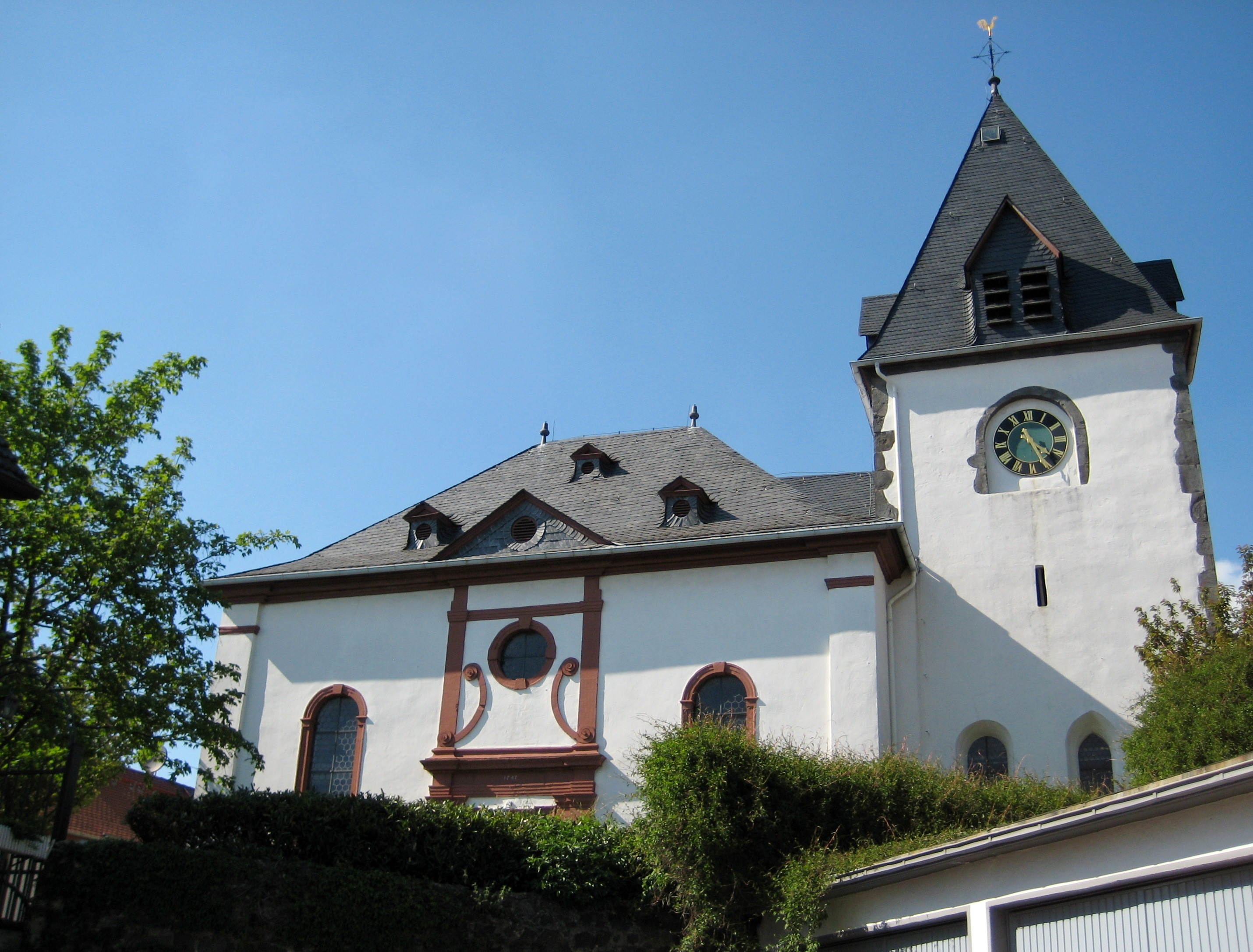 Bettenhäuser Kirche